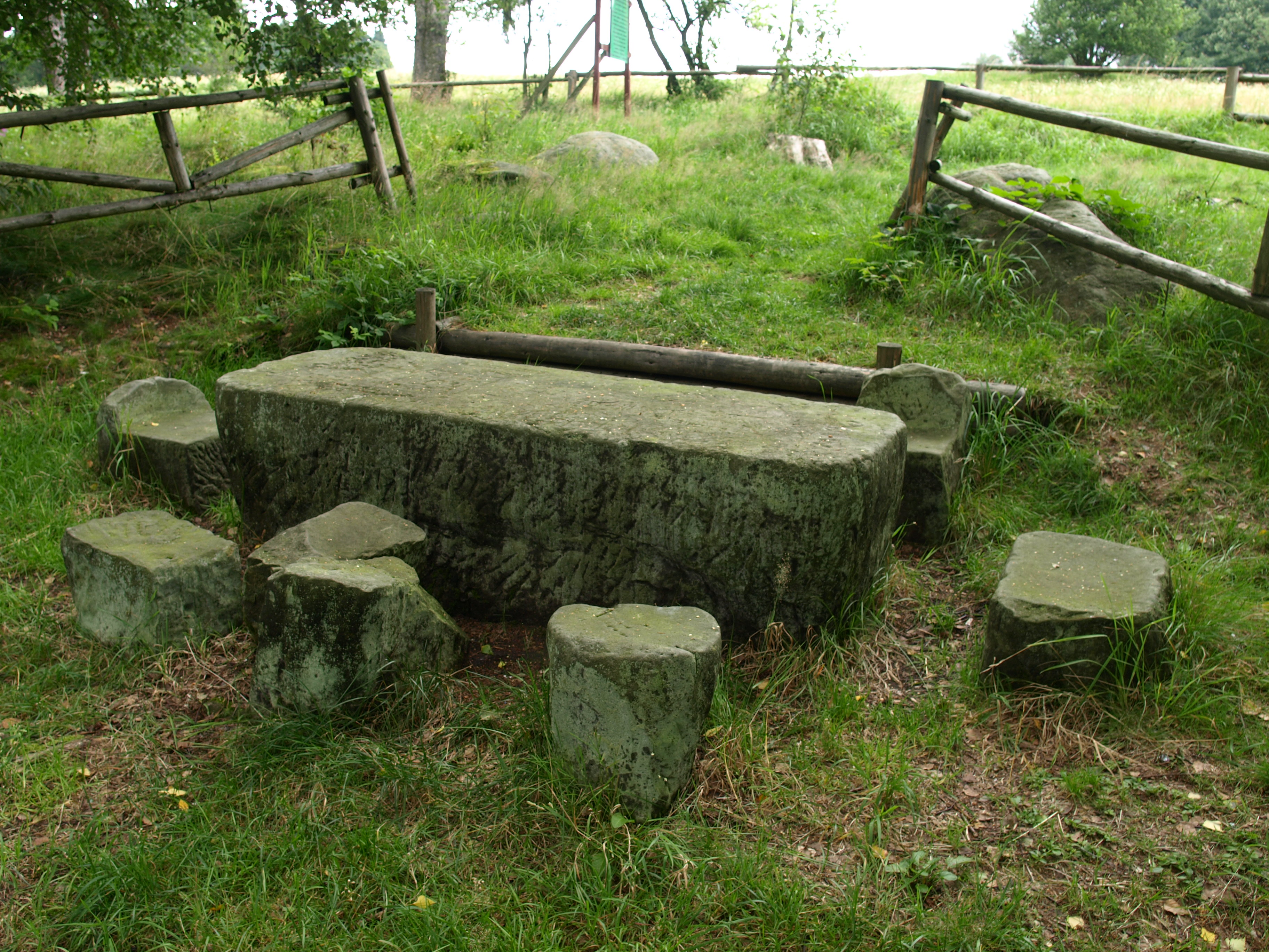 medieval trial place (sąd sołtysi) Kochanów, Poland